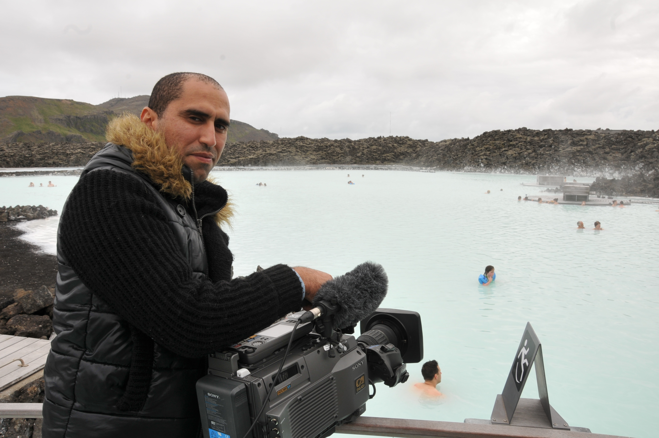 Hassan Boufous au Blue Lagoon, Islande 2010